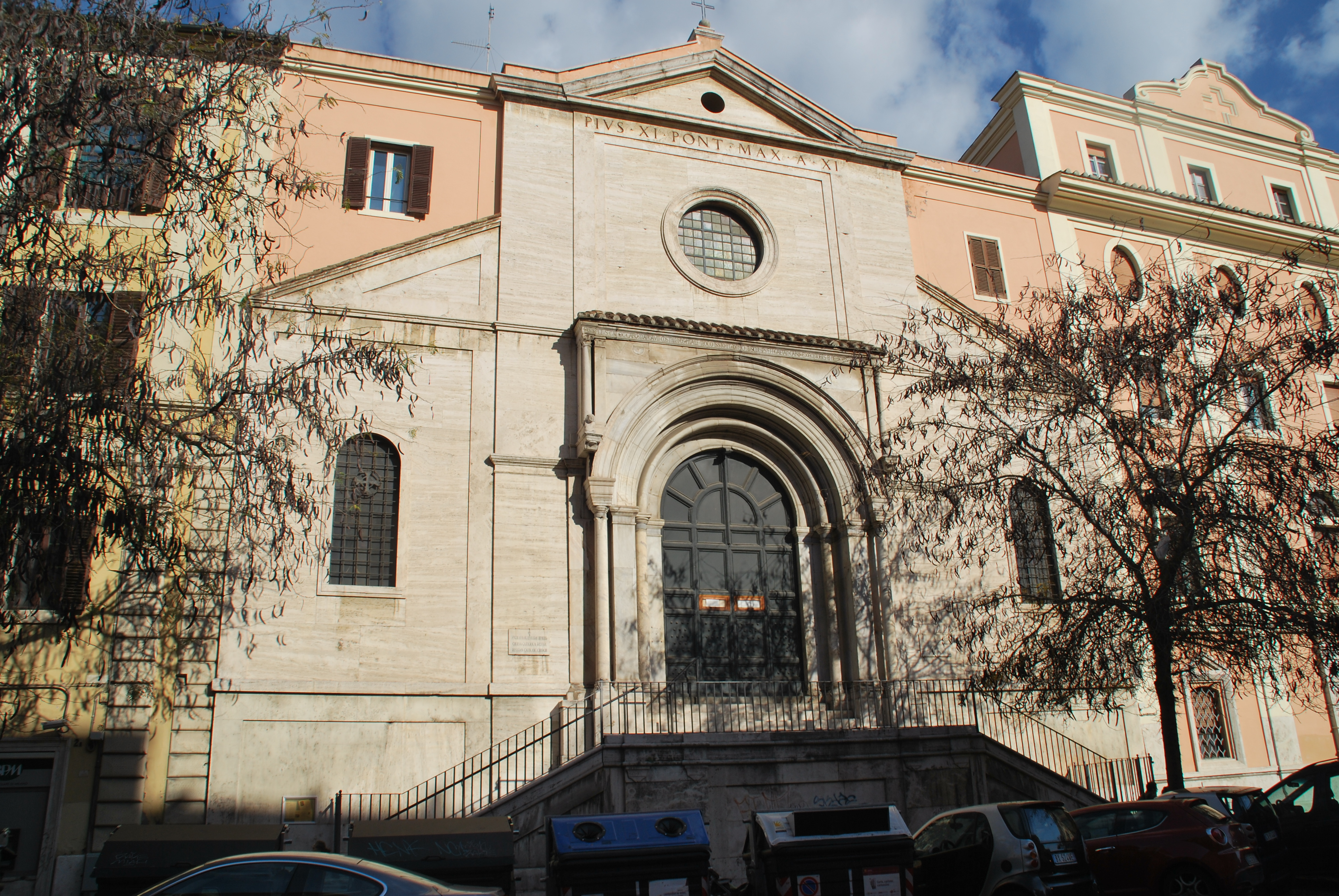 Chiesa Cattolica Russa